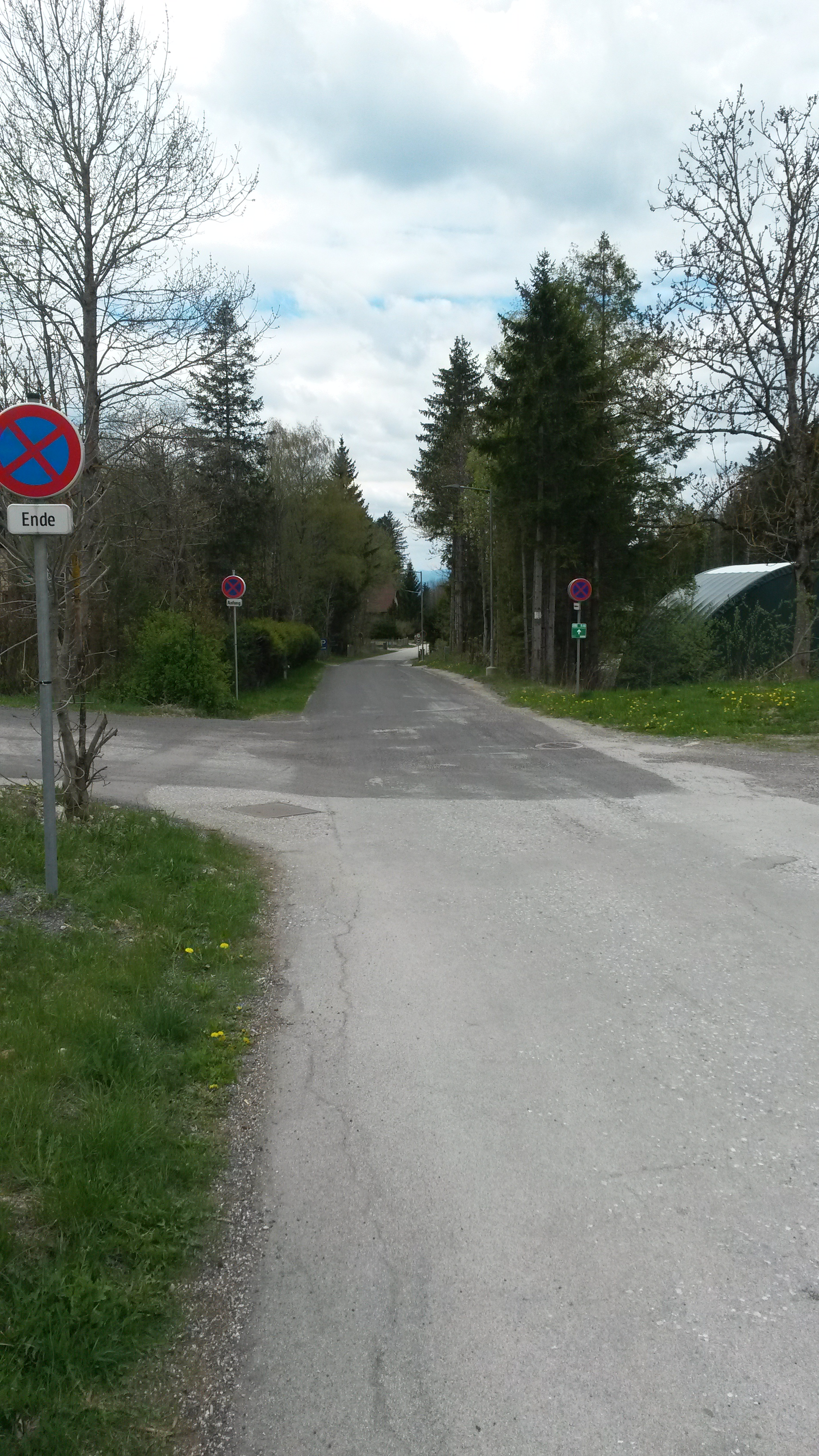 Teilstück der Alten Reichsstraße, Passhöhe Richtung Mürztal.